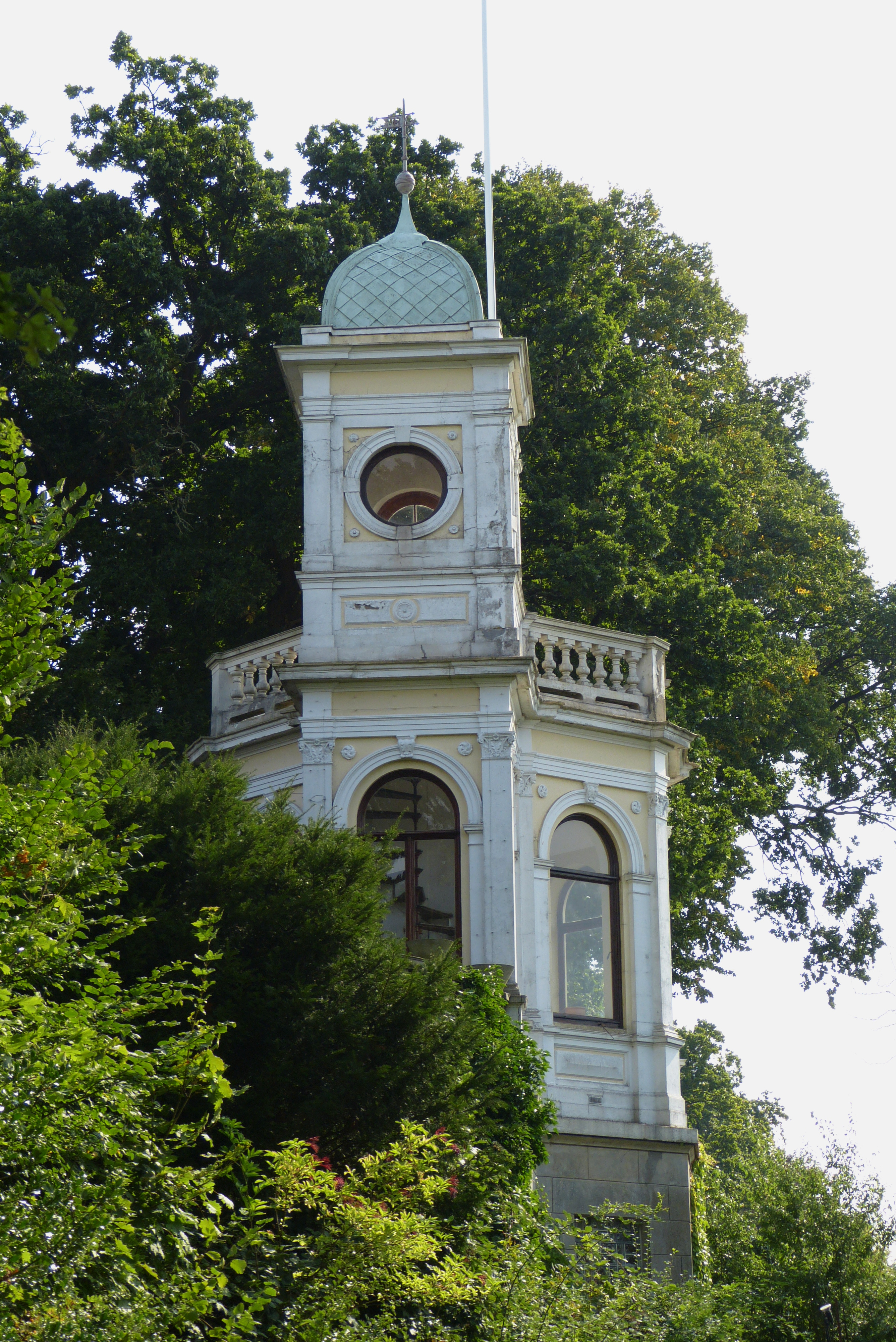 Villa Fritze, Teehaus in Bremen, Weserstraße 75CDas abgebildete Objekt ist ein geschütztes Kulturdenkmal in der Freien Hansestadt Bremen, mit der Nr. 1858 beim Landesamt für Denkmalpflege registriert.